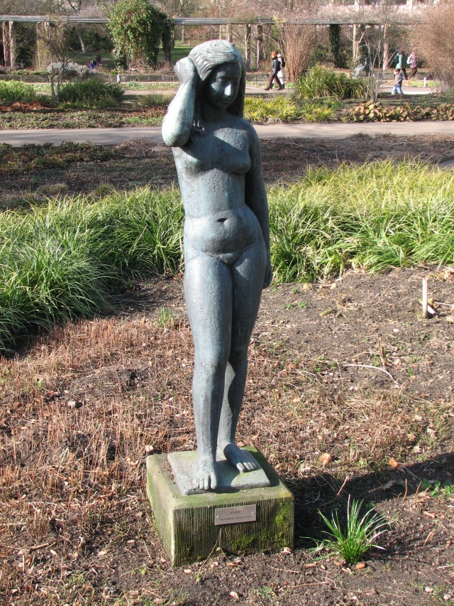 "Inge" von Walter Arnold, 1949 in Potsdam/Germany